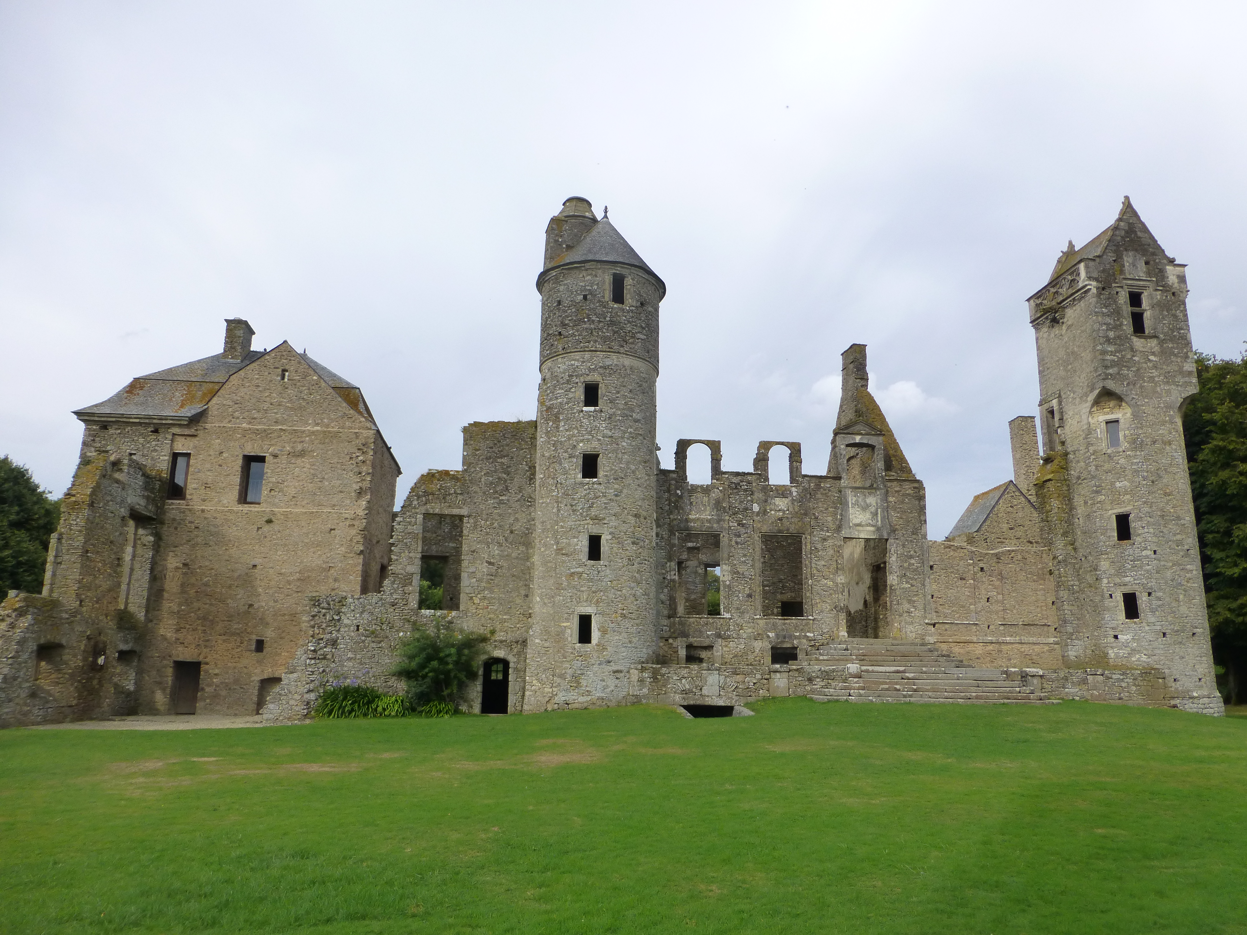 Ruines principales, tours et aile restaurée du 18è siècle du Château de Gratot, Manche, Normandie, France.